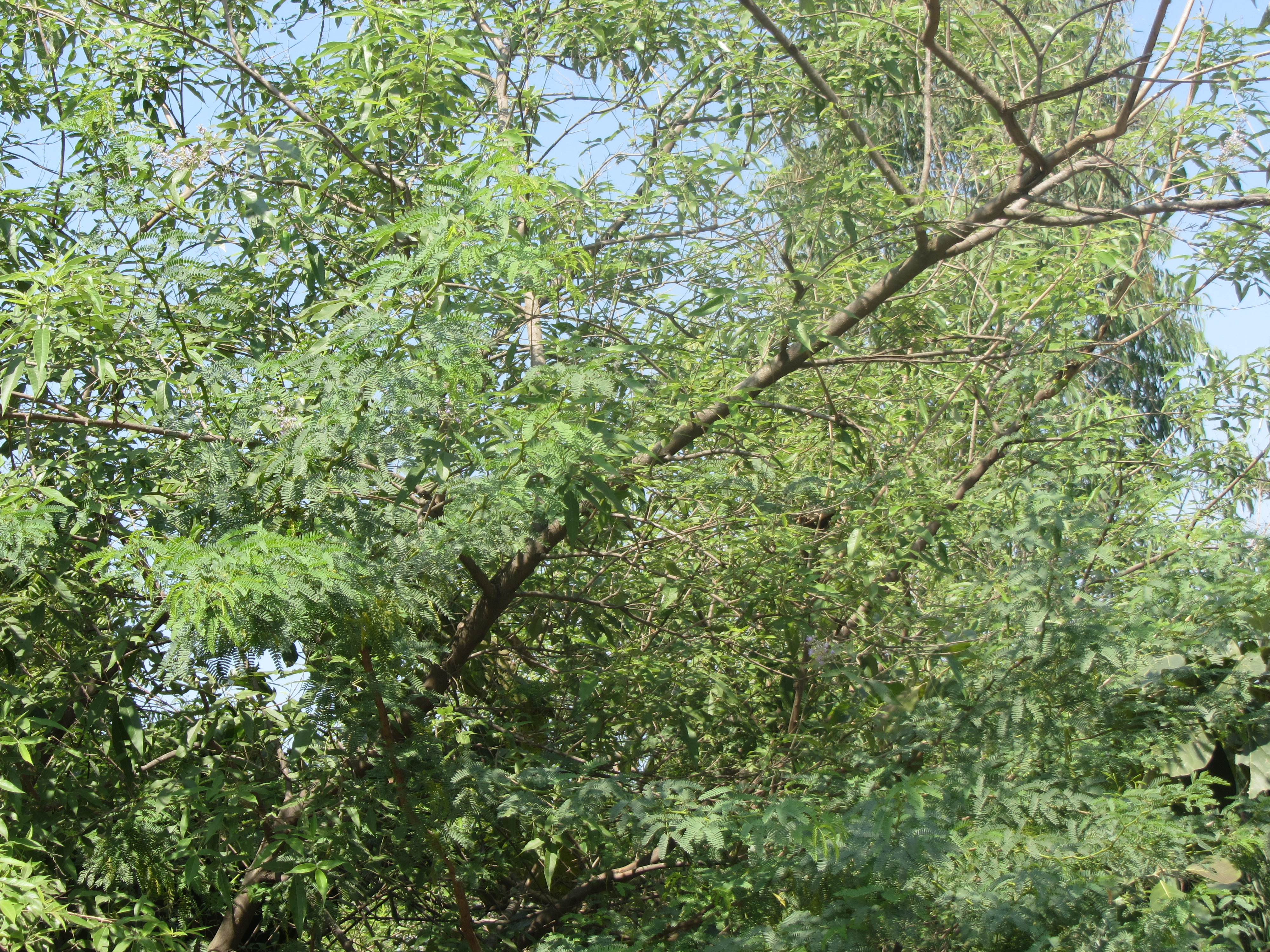 vitex altissima நொச்சிமரம். வேலியாகவும், வேலி கட்டவும் பயன்படும் மார்கள் தரும் மரம். இதன் பூவைச் சூடியே பழங்கால நொச்சிப்போர் நடைபெற்றது.